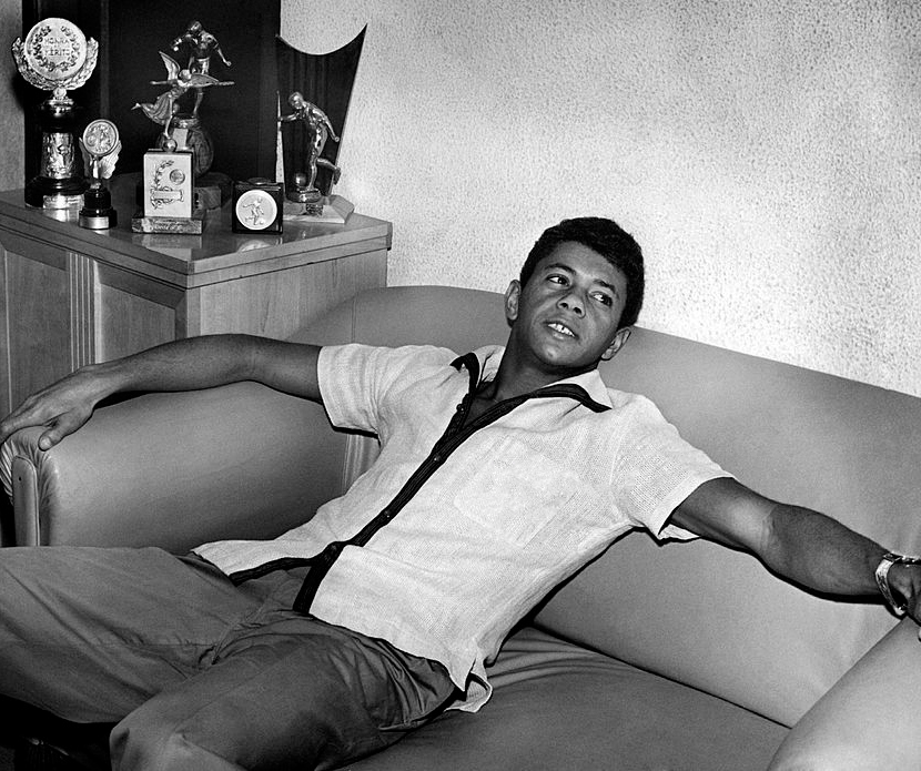 Amarildo Tavares da Silveira (Amarildo) at home